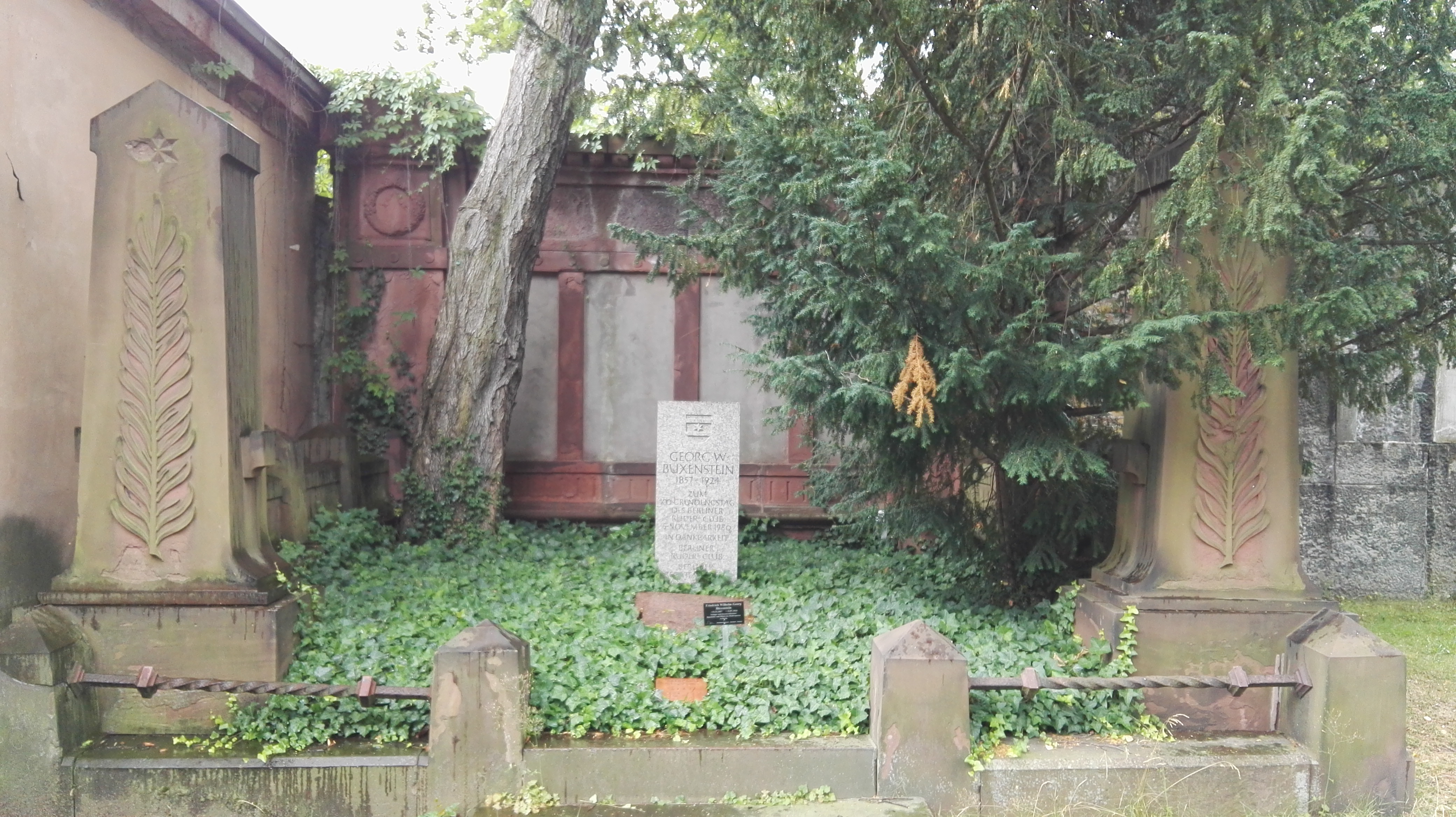 Grab von Friedrich Wilhelm Georg Büxenstein auf dem Jerusalems- und Neue Kirche, Friedhof I in Berlin; Ehrengrab